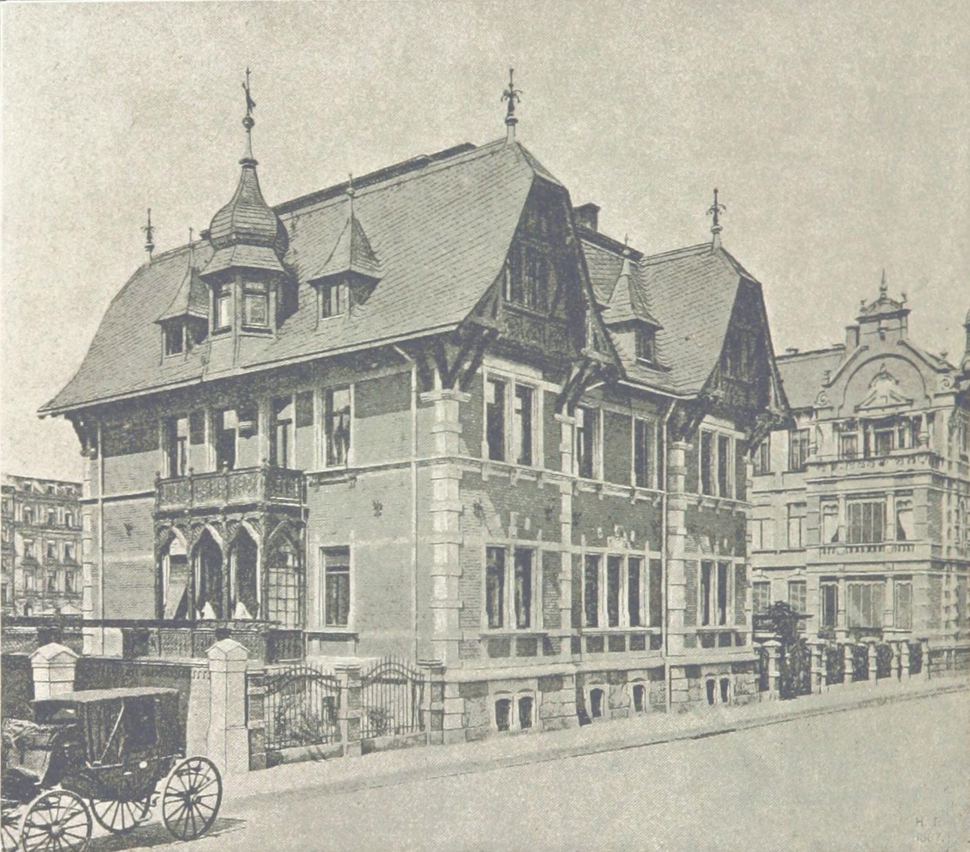 Villa Dr. Julius Gensel in der Hillerstraße 3 im Leipziger Bachviertel Julius Gensel wirkte nicht nur als Notar und Rechtsanwalt, sondern war zugleich auch Sekretär der (Industrie- und) Handelskammer Leipzig 1883 ließ er sich von dem Berliner Architekten Heinrich Stöckardt seine repräsentative Villa in der Leipziger Hillerstraße 3 errichten.